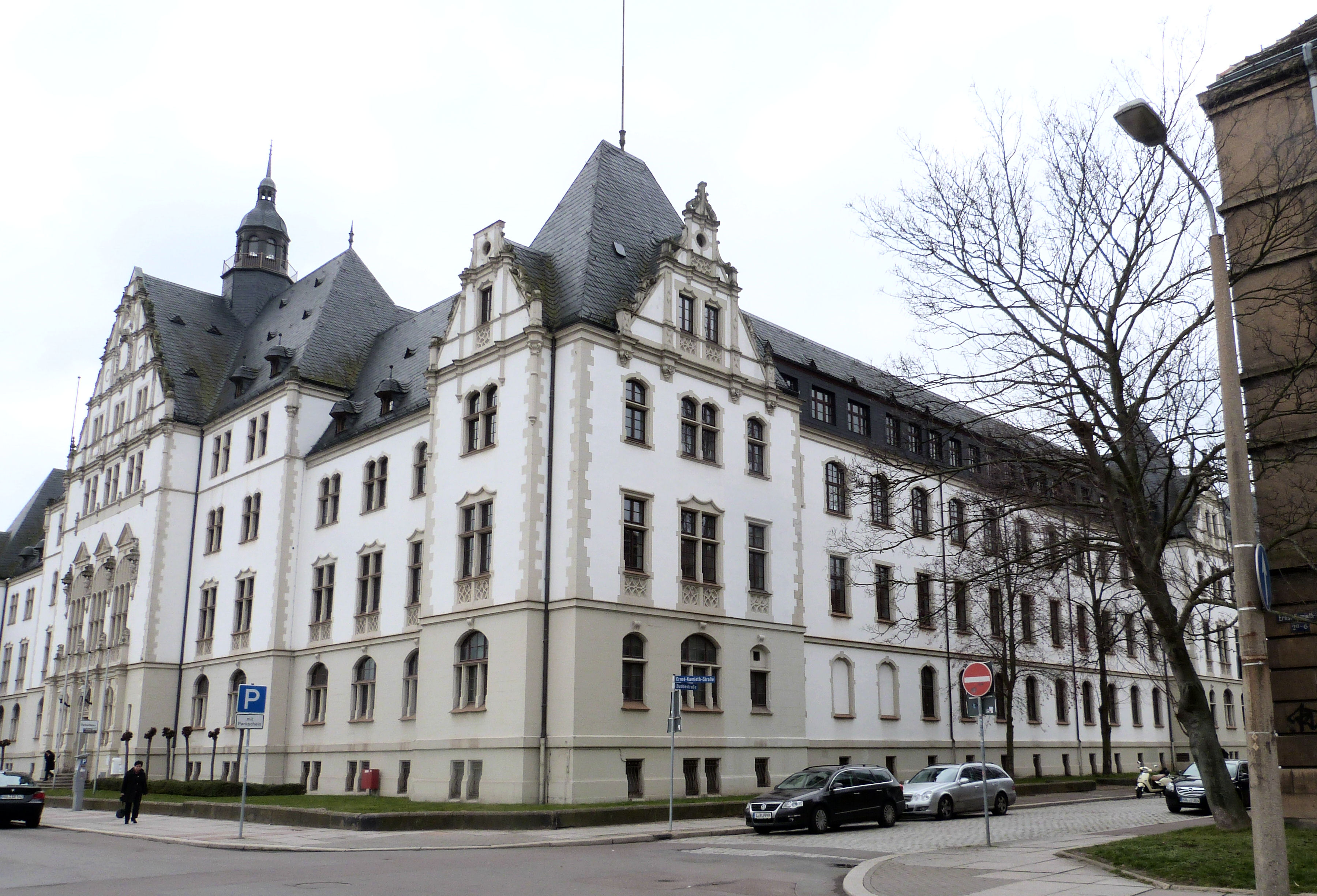 Ernst-Kamieth-Straße 2, Landesverwaltungsamt Sachsen-Anhalt, ehem. Reichsbahndirektion, Halle (Saale)